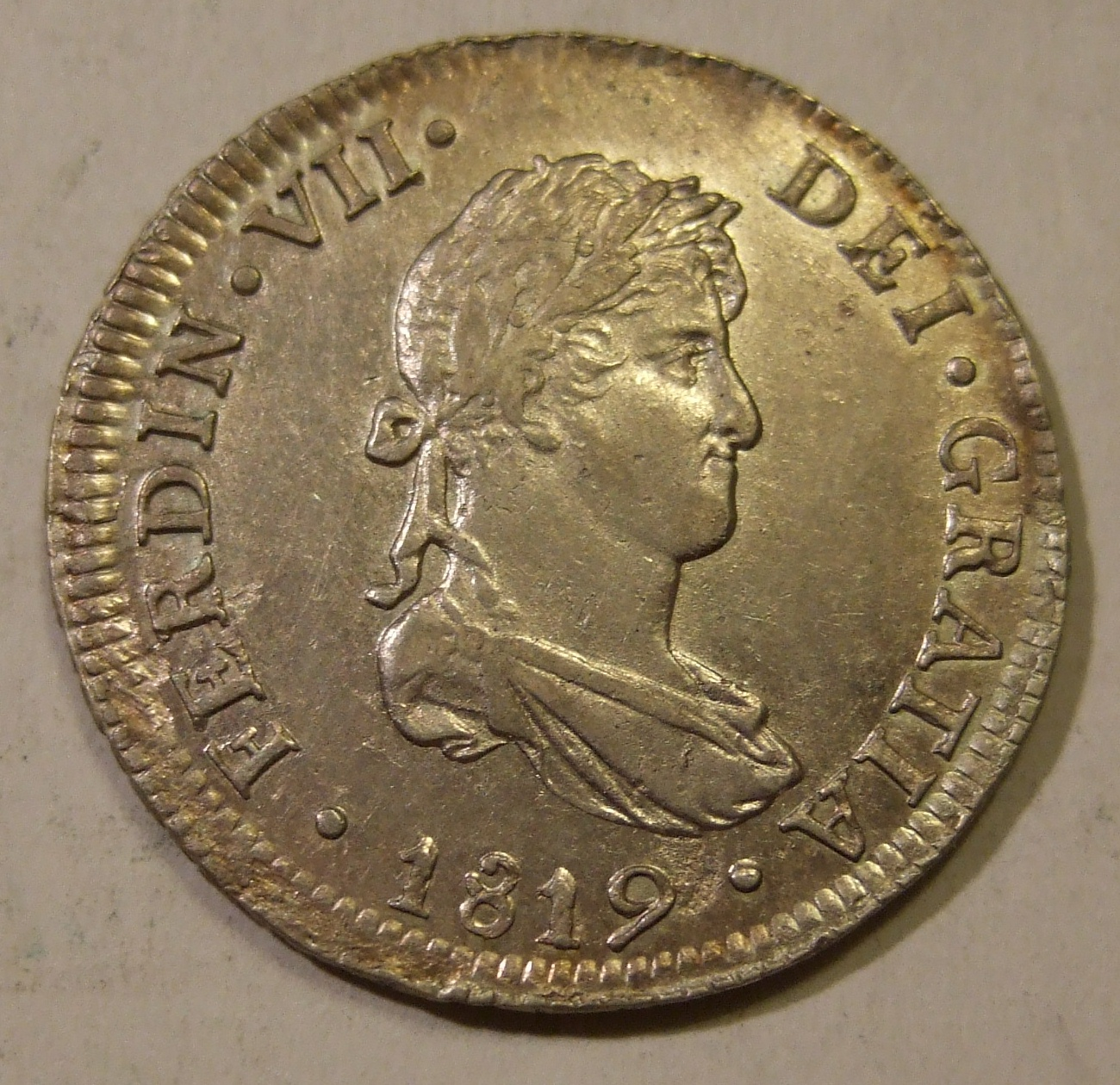 SPANISH AMERICA, PERU MINT, FERDINAND VII 1819 ---2 REALES b